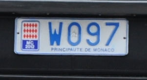 Tablica rejestracyjna, 2012. Monaco.